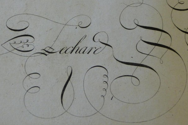 Signature de Lechard dans ses Fragments des écritures batarde et coulée brisées (Paris : Jean, 1799)